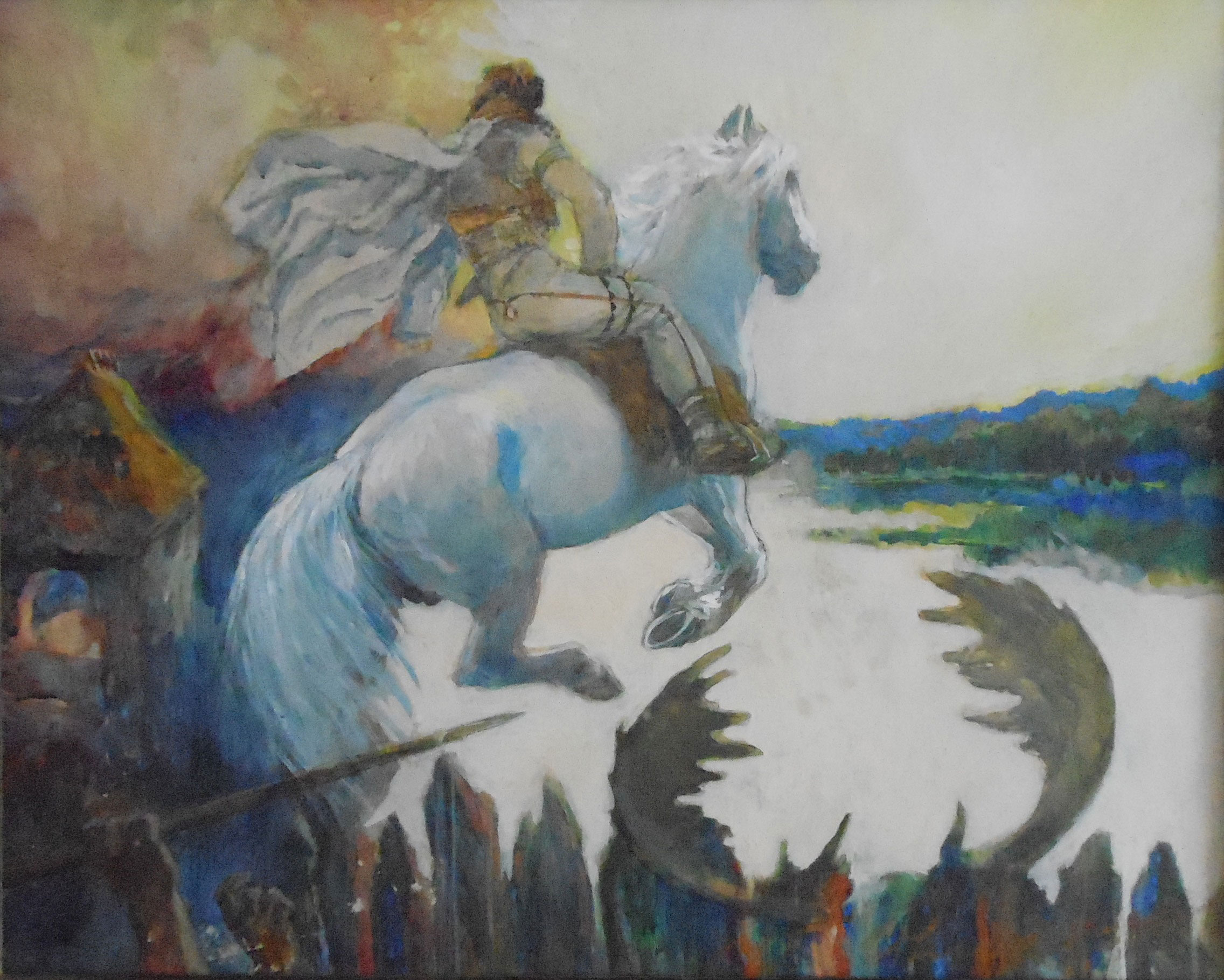 Oldřich Cihelka: Horymír. Tempera 100 × 80 cm.